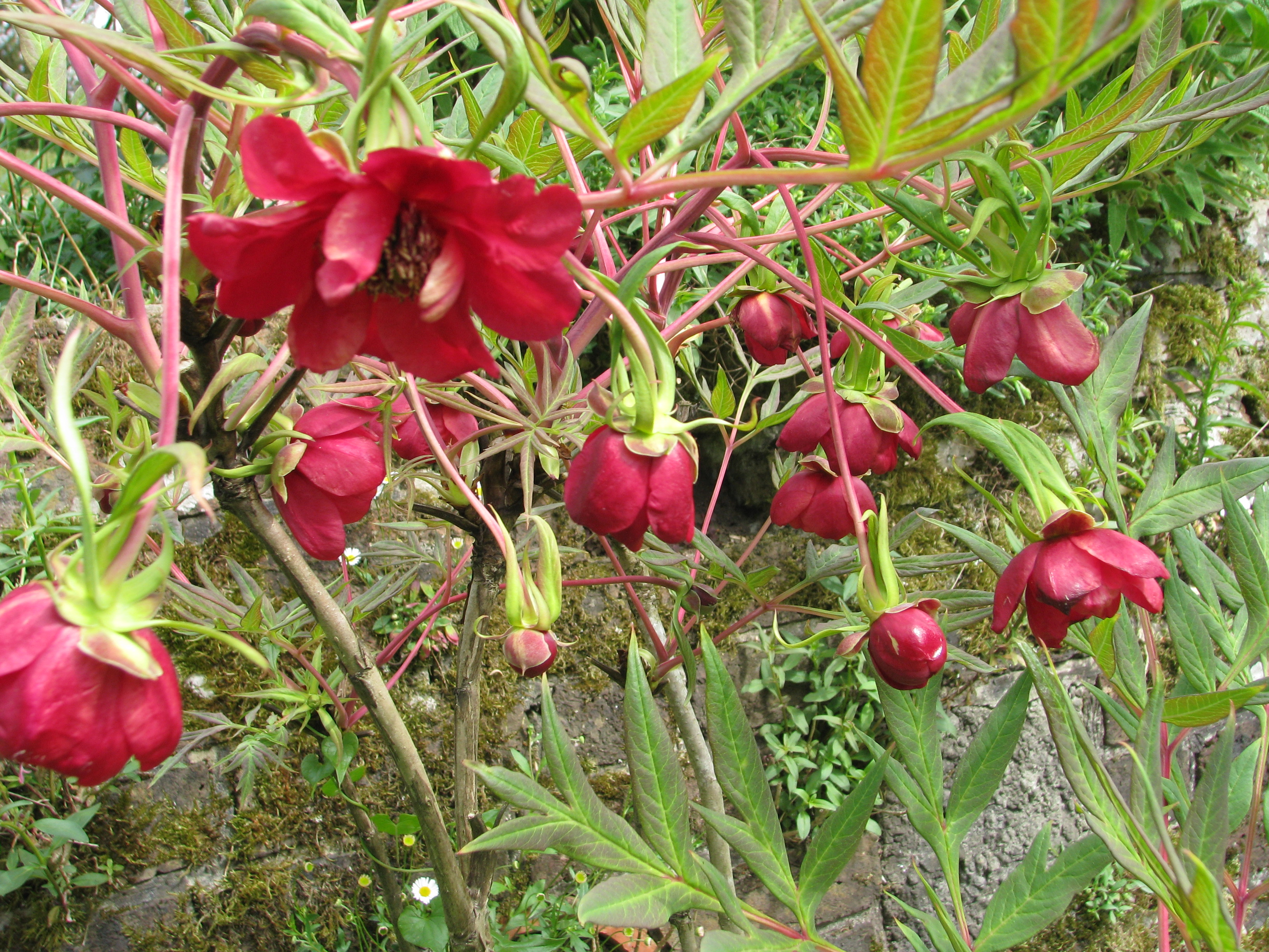 Paeonia delavayi